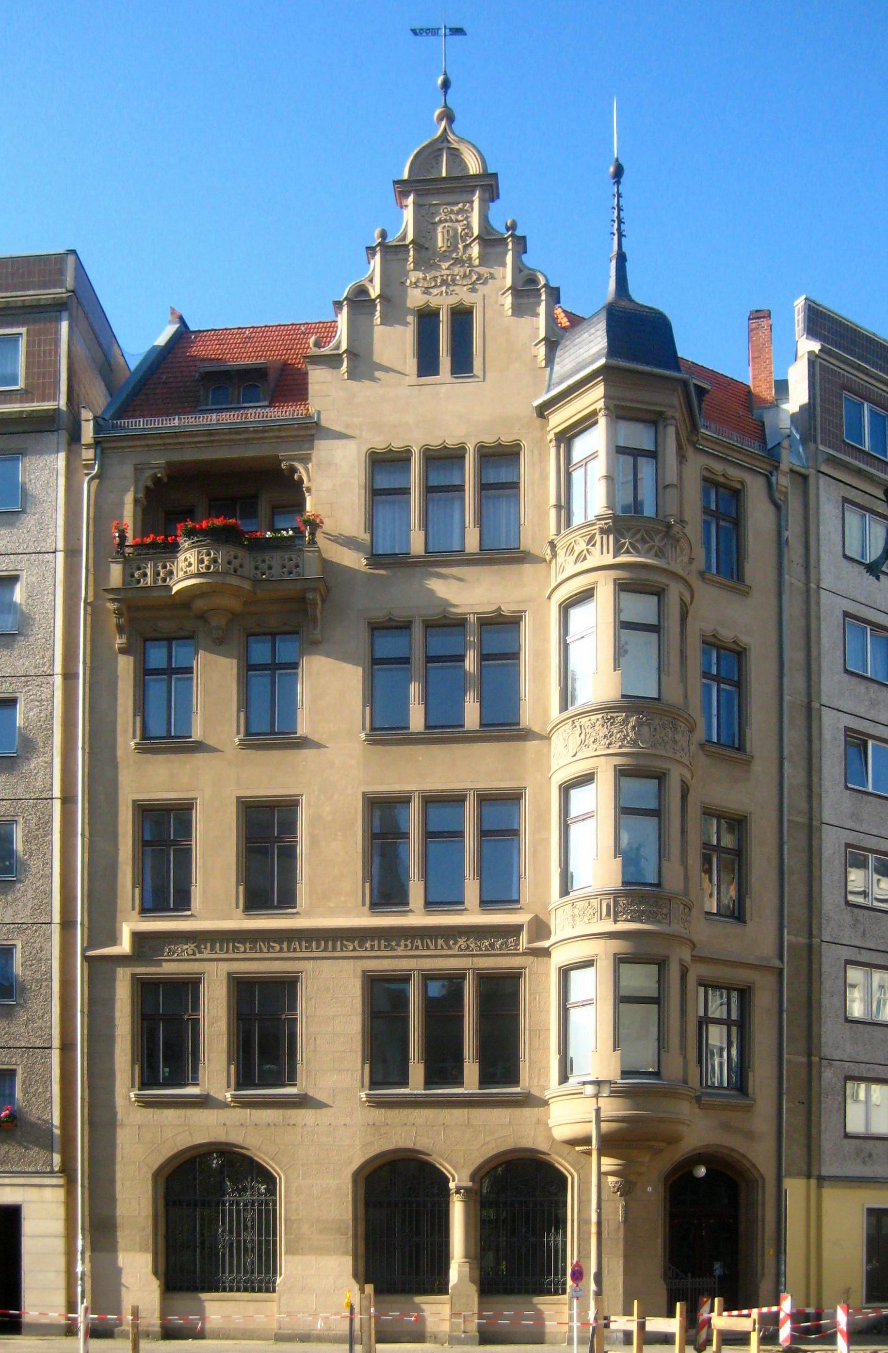 Die ehemalige Luisenstädtische Bank in der Köpenicker Straße 95 in Berlin-Mitte. Das letzte erhaltene historische Gebäude an der Südseite des Schulze-Delitzsch-Platzes wurde 1898-1899 nach einem Entwurf der Architekten Gustav Knoblauch errichtet. Der Grundriss des Gebäudes in den Formen der Neorenaissance folgt einem stumpfwinkligen Knick am Übergang der Köpenicker Straße in die Neue Jakobstraße, schwächt den Effekt aber durch einen Erker mit Dachhaube ab. Der Schriftzug "Luisenstädtische Bank" und ein Gesimsband heben an der Fassade die Trennung der Geschäftsräume in den ersten beiden Stockwerken von den großzügigen Wohnungen in den Obergeschossen heraus. Die dekorativen Fassadenelemente samt dem Stufengiebel über der Mittelachse sind in Sandstein gearbeitet. Im Inneren sind die Geschäftsräume und der ehemalige Tresorraum im Kellergeschoss durch eine separate Treppe verbunden. Da Gebäude wurde ab 1928 von der Köpenicker Bank und in der DDR-Zeit vom VEB Elektrotechnik genutzt. Nach Rückübertragung an die Köpenicker Bank 1990 erfolgte eine Rekonstruktion. Nach Fusion mit der Grundkreditbank zog die Köpenicker Bank 1998 aus und die Geschäftsräume stehen heute leer (Stand: Juli 2009). Das Gebäude ist als Baudenkmal gelistet.